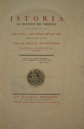 Sarconi Michele (et alii) Istoria de' Fenomeni del Tremoto avvenuto nelle Calabrie, e nel Valdemone nell'anno 1783 posta in luce dalla Reale Accademia delle Scienze, e delle Belle Lettere di Napoli - Prima edizione - in Napoli, presso Giuseppe Campo, 1784 (Cronaca di uno tsunami italiano nel 1783)